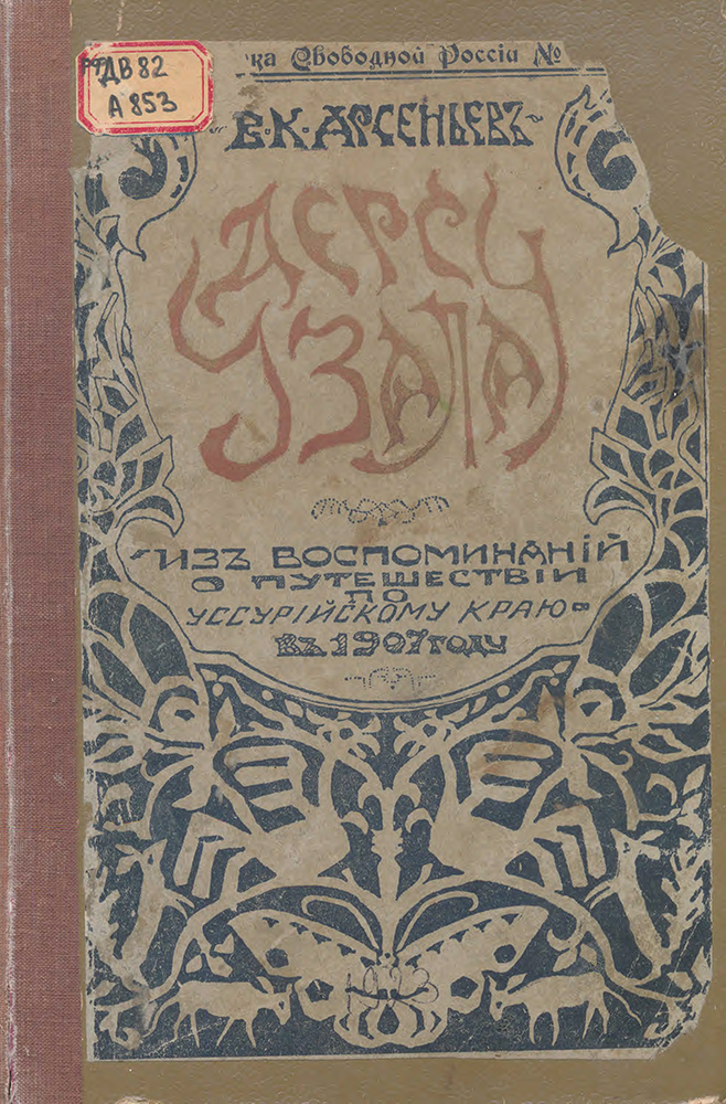 Обложка первого издания романа Владимира Клавдиевича Арсеньева «Дерсу Узала», 1923 г.